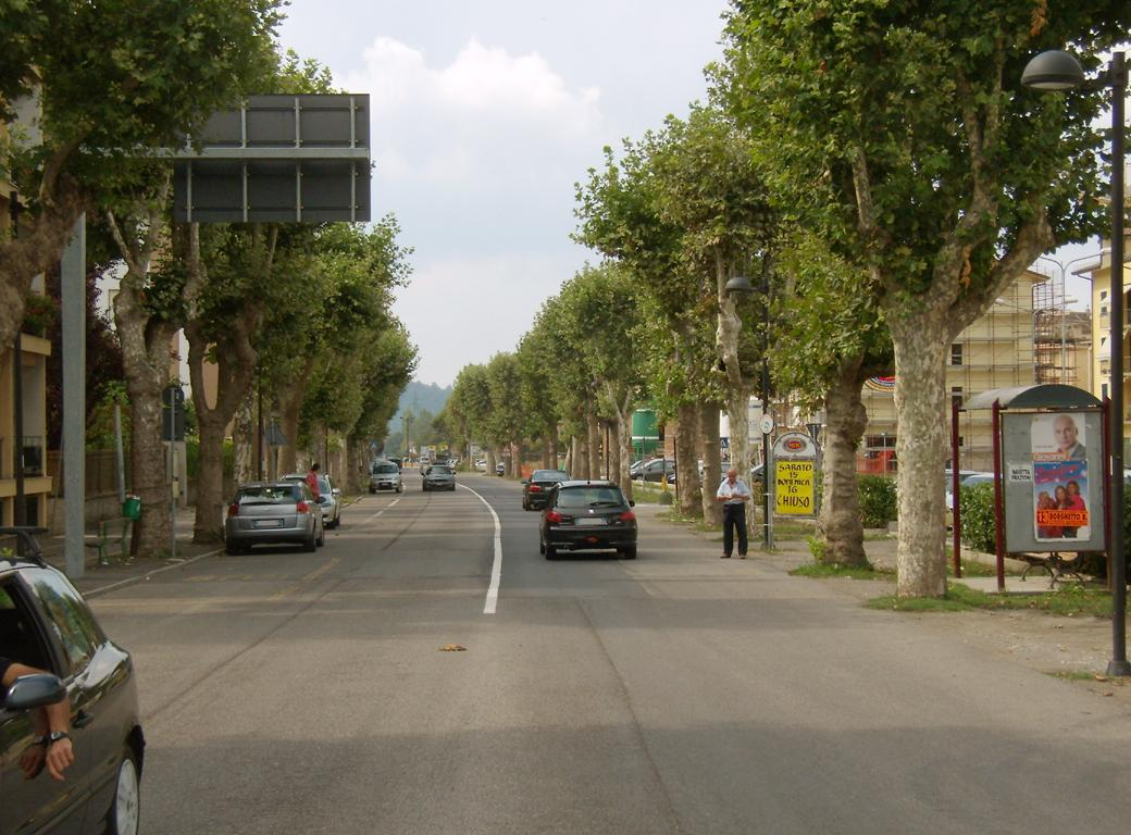 Via Roma ad Arquata Scrivia; la strada, costruita sul vecchio sedime della ferrovia Torino-Genova, è parte della SS 35 dei Giovi.